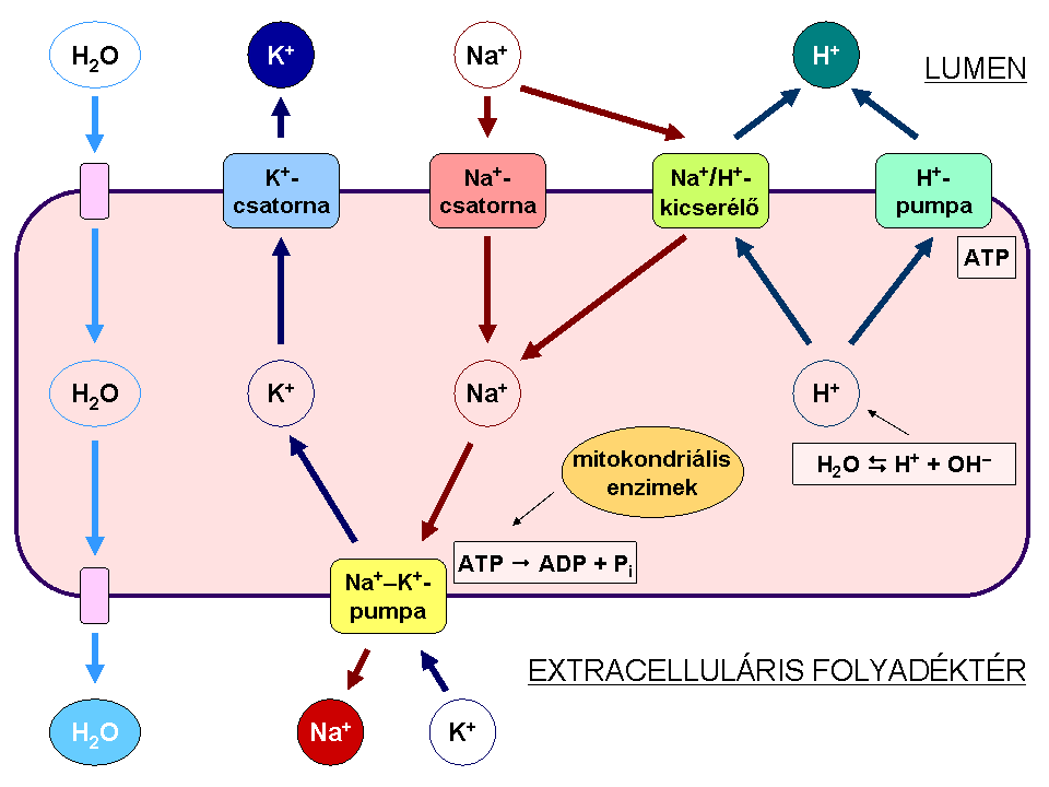 Sematikus ábra a mineralokortikoid hormon (aldoszteron) hatásáról. A célsejtek apikális membránján a nátrium- és kálium-csatorna, a nátrium/hidrogén-kicserélő karrier és a hidrogén-pumpa működése fokozódik; a bazolaterális membránon a nátrium-kálium-pumpáé. A pumpa fehérjék működésükhöz ATP-t igényelnek, így logikus, hogy a hormon a mitokondriális enzimek szintézisét is fokozza. Az eredmény: K és H szekréció és Na reabszorpció, mely utóbbi vízretencióval is együtt jár.